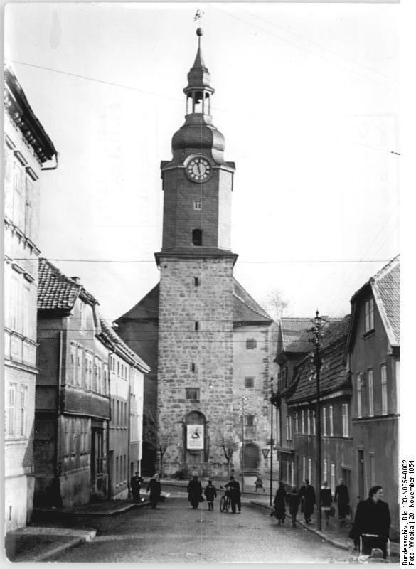 Ilmenau, Stadtkirche, Karl-Zink-Straße Zentralbild TBD-Wlocka-29.11.1954 Film-Nr. 754 Stimmungsbilder von Ilmenau. Bild 2: Die Stadtkirche von Ilmenau mit Karl-Zink-Strasse Information added by Wikimedia users. Vgl. Bild von 2004